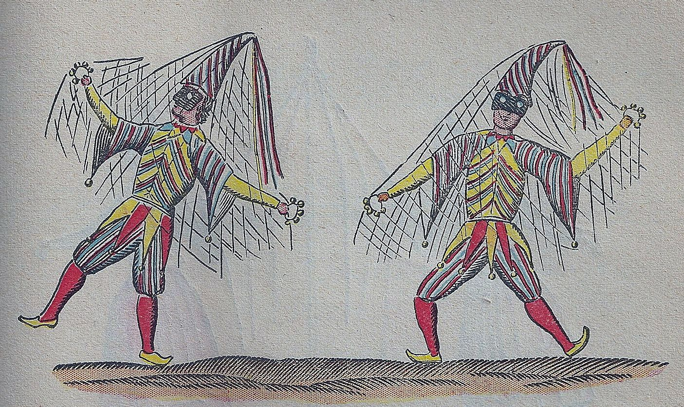 Dibuix fet per Andreu de Bofarull del Ball de Prims. Abans de 1890